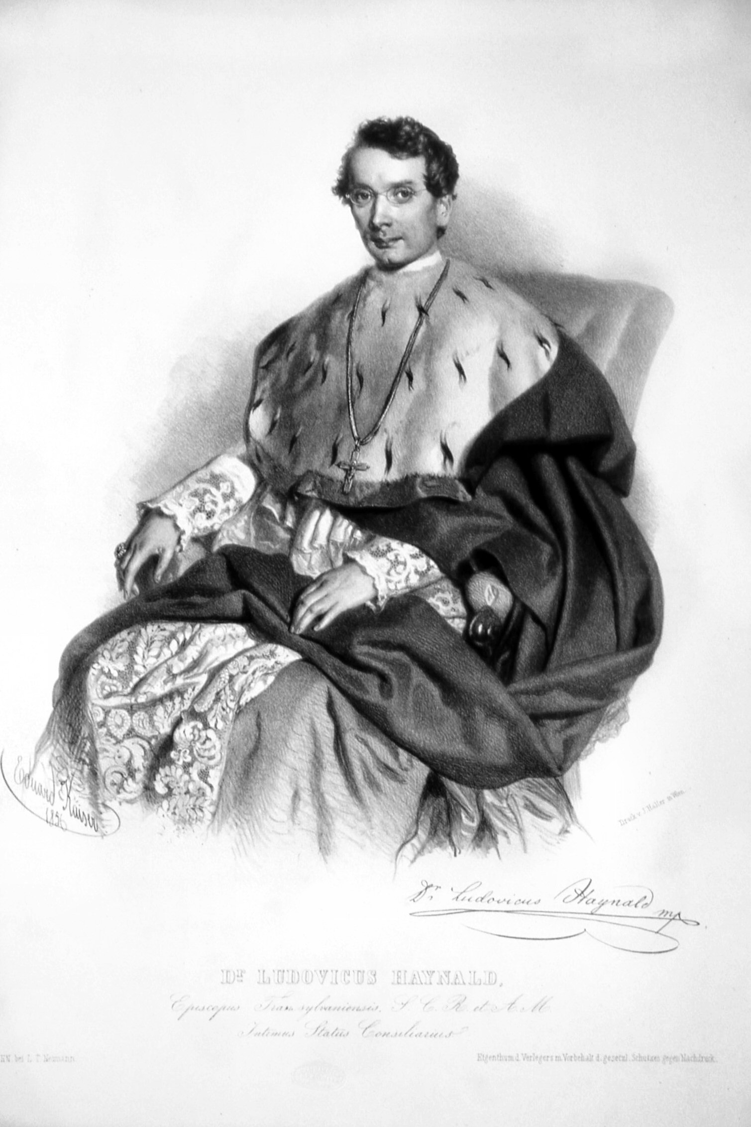 Ludwig Haynald (1816-1891), Bischof von Kolocsa, Kardinal, Botaniker. Lithographie von Eduard Kaiser, 1856